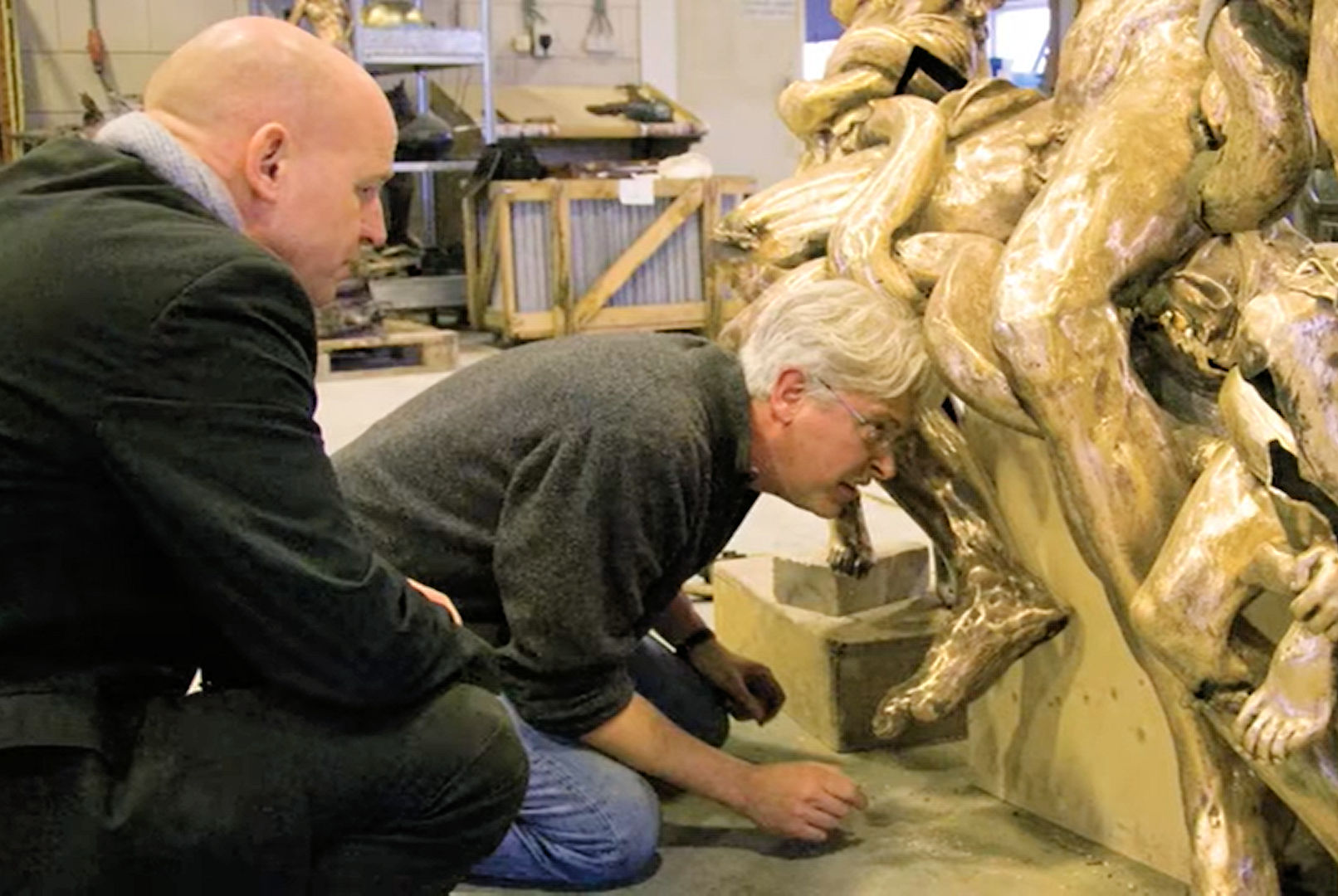 Frits Scholten en Willem Noyons bij de reproductie van de Laocoöngroep, die wordt gerekend tot de Righetti-beeldengroep bij Paviljoen Welgelegen